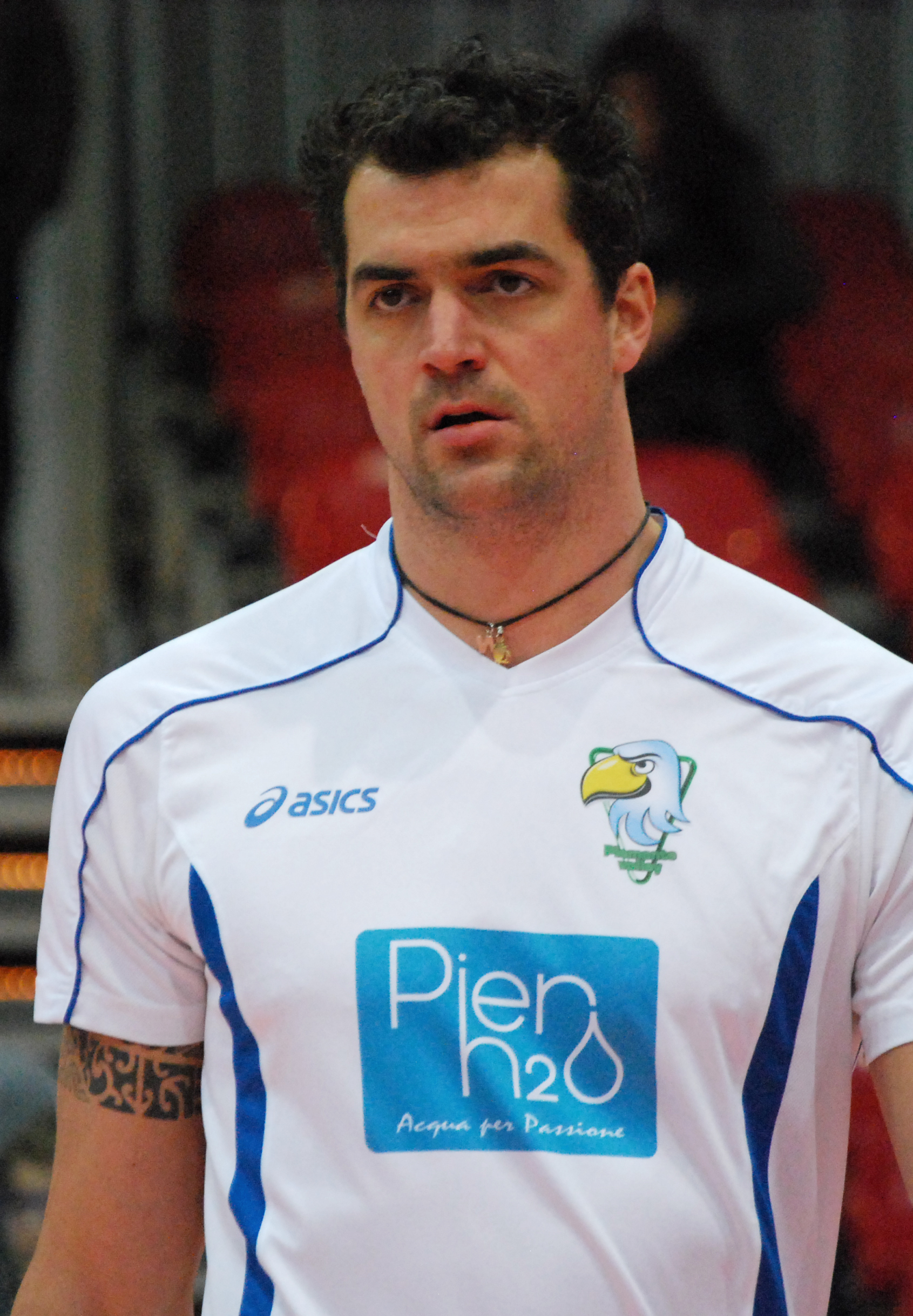 Wout Wijsmans